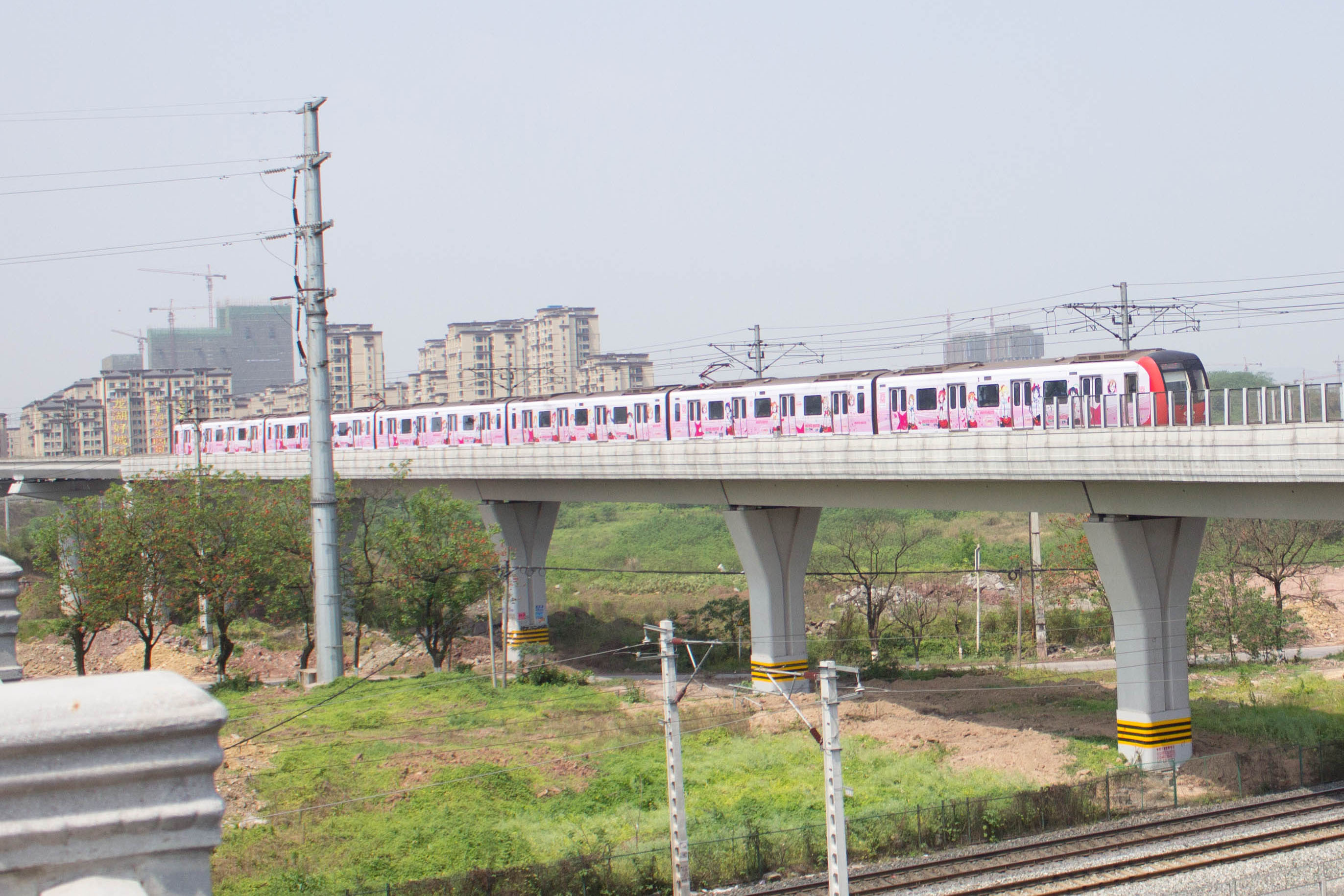 重庆轨道交通一号线Lovelive!涂装列车从微电园站驶向赖家桥站